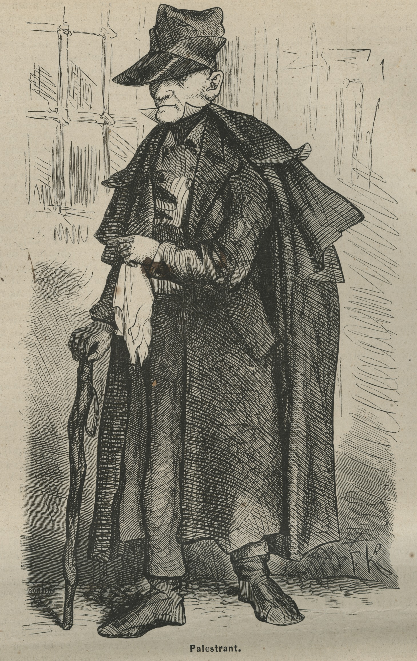 Palestrant